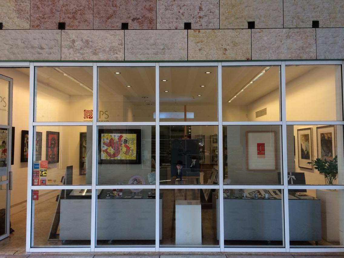 Loja do CPS no Centro Cultural de Belém